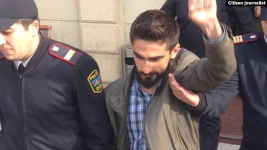 Qiyas İbrahim